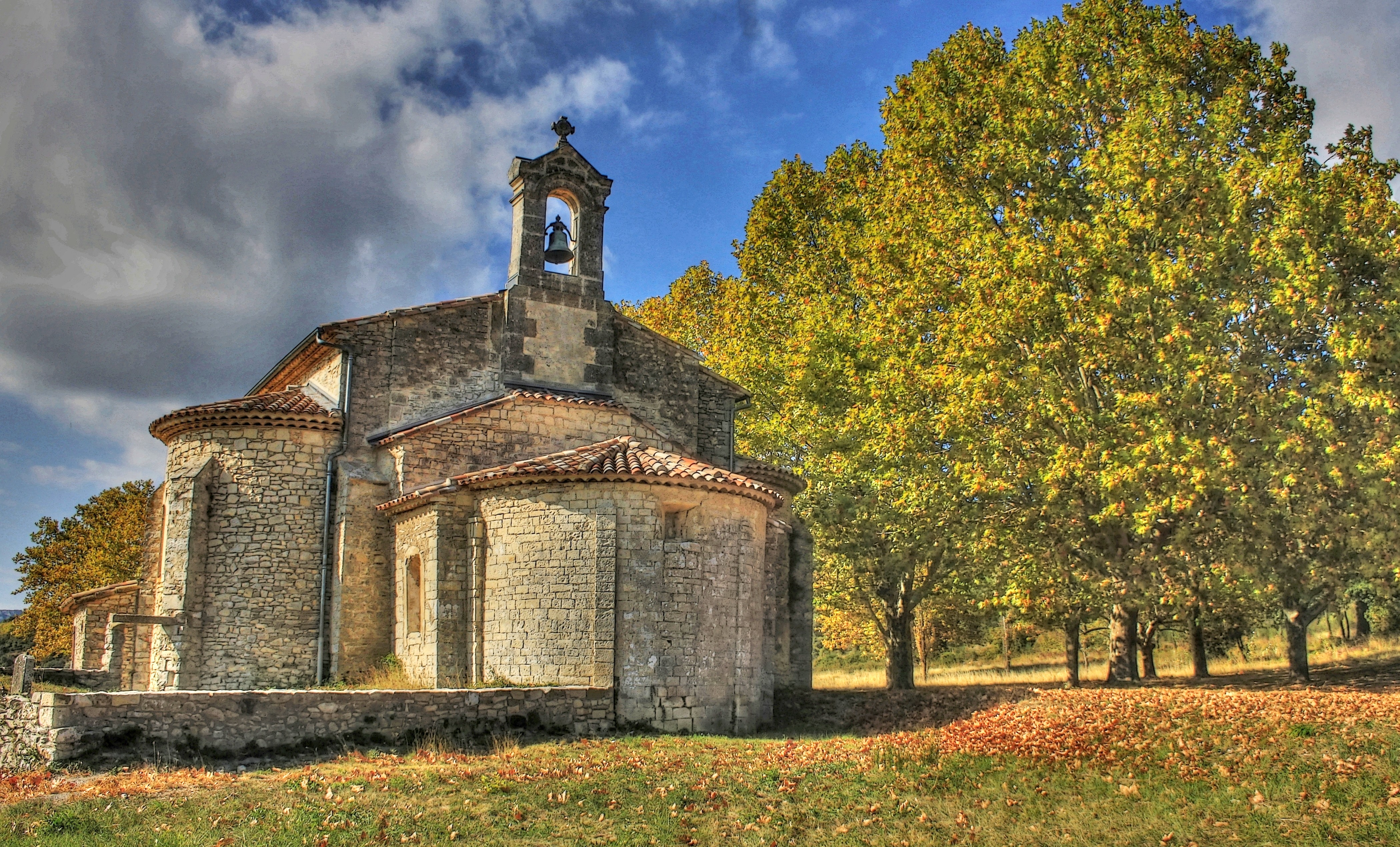 Chapelle Notre-Dame d'Aleyrac